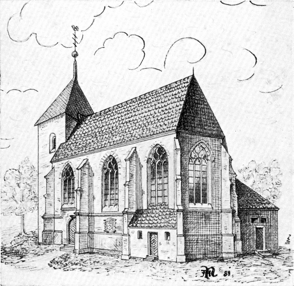 St. Johannes Baptist Greffen